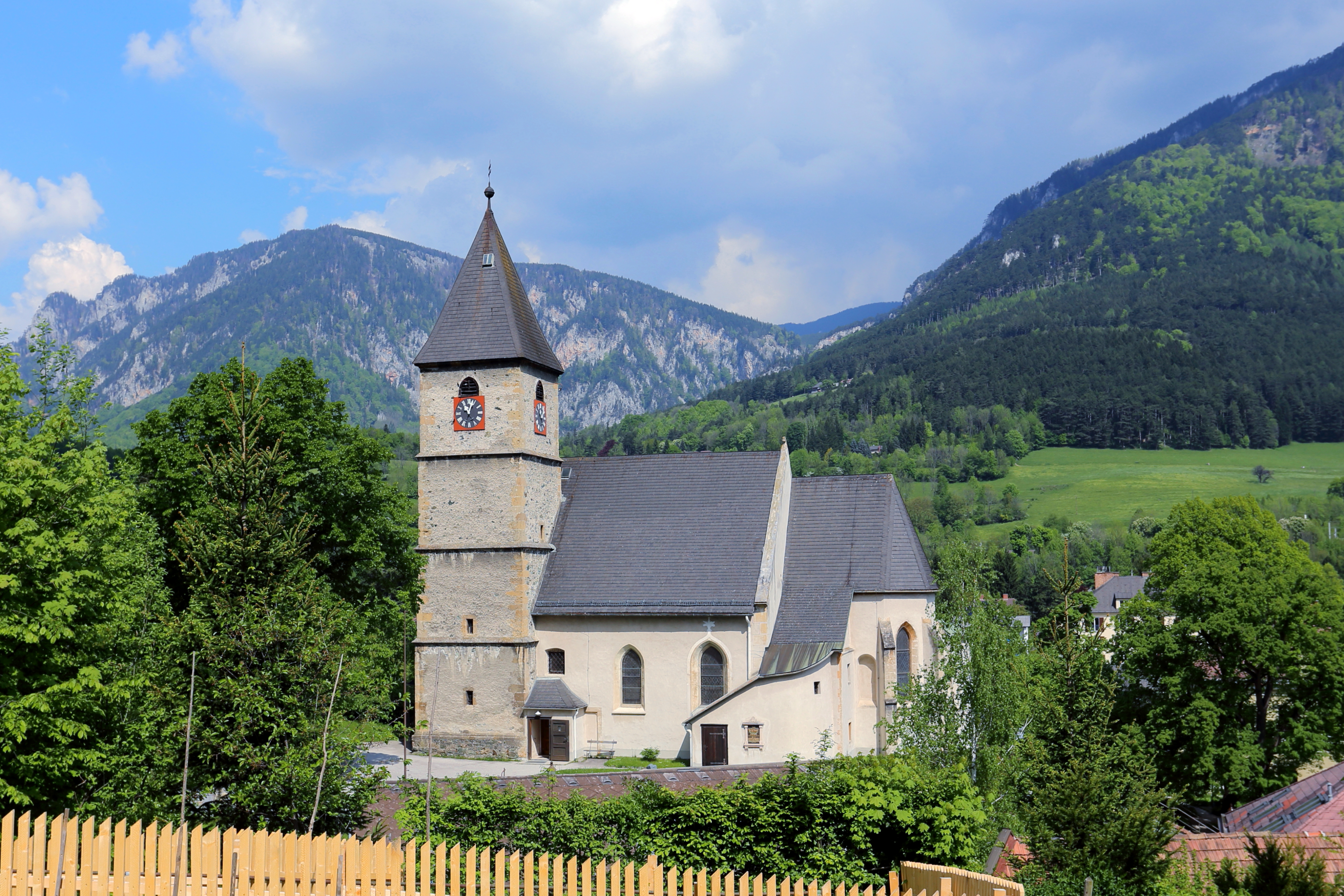 Die katholische Pfarrkirche hl. Jakob der Ältere in der niederösterreichischen Marktgemeinde Payerbach. Die zweischiffige spätgotische Hallenkirche mit einer romanischen Kernsubstanz und einem Südwestturm scheint urkundlich 1447 auf. Ursprünglich ein romanisches, einschiffiges Gotteshaus mit Ostapsis, von dem noch die West- und Nordmauer und ein Freskorest erhalten ist. Um 1350 errichtete man ostseitig einen hochgotischen Chor mit starken Stützmauern. In der 2. Hälfte des 15. Jahrhunderts erfolgte eine spätgotische Umgestaltung der Kirche und von 1510 bis 1525 ein Umbau sowie Erweiterung der Kirche, indem man den Kirchturm errichtete, die Kirche zu einer zweischiffigen Hallenkirche Richtung Süden ausbaute und sie mit einem spätgotischen Netzrippengewölbe versah. 1828 führte man verschiedene Um- und Zubauten aus (neue Sakristei und neues Orgelempore).